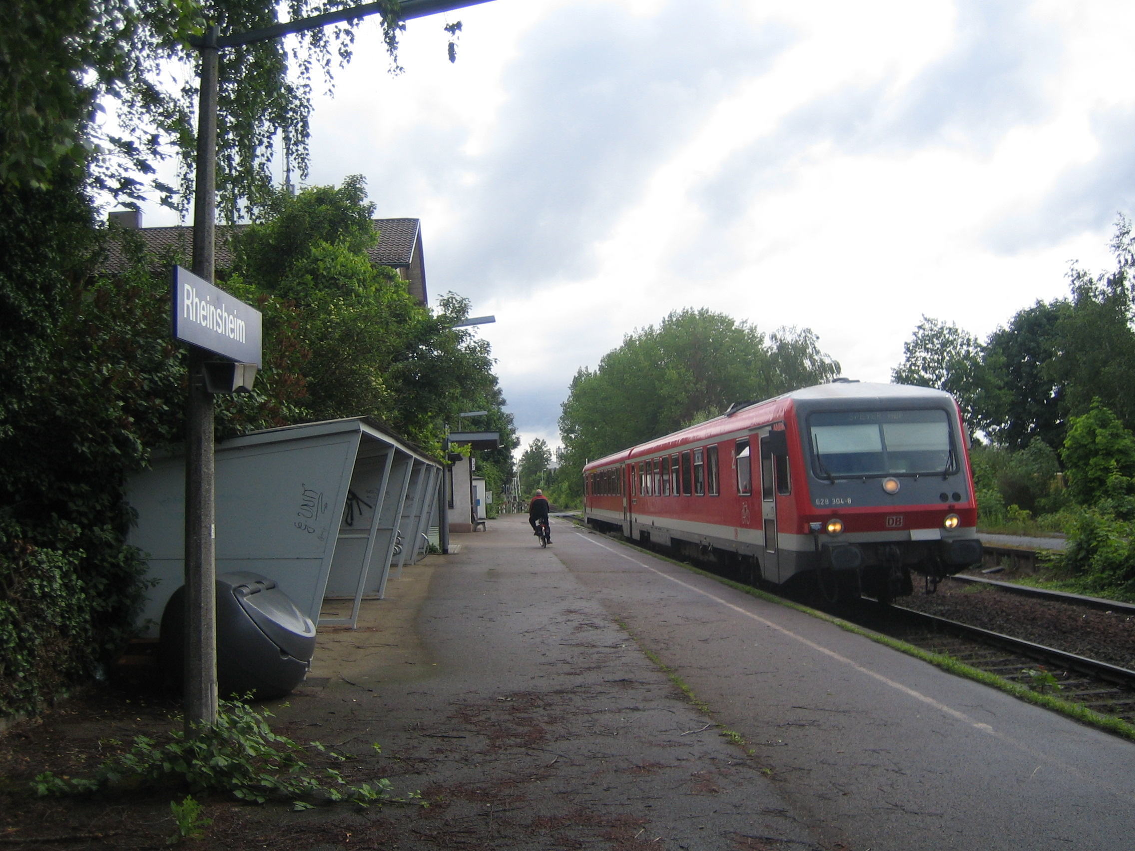 Baureihe 628 304-8 im Bahnhof Rheinsheim